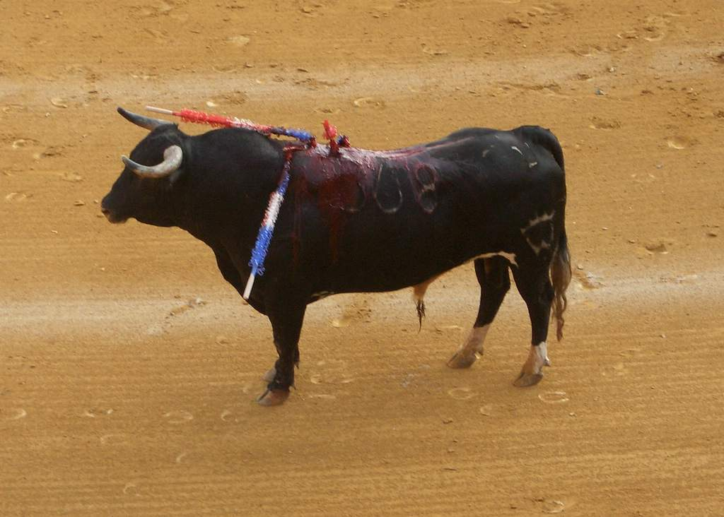 Stier in der Stierkampfarena von Malaga